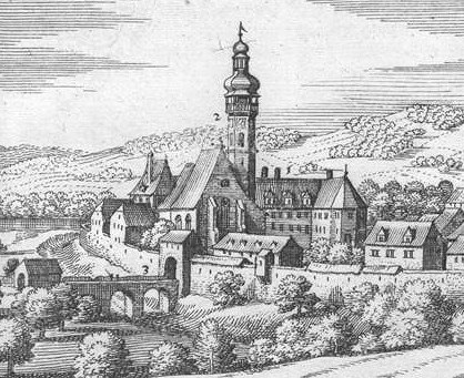 Kupferstich der Pfarrkirche und des dahinter liegenden Schlosses in Eferding